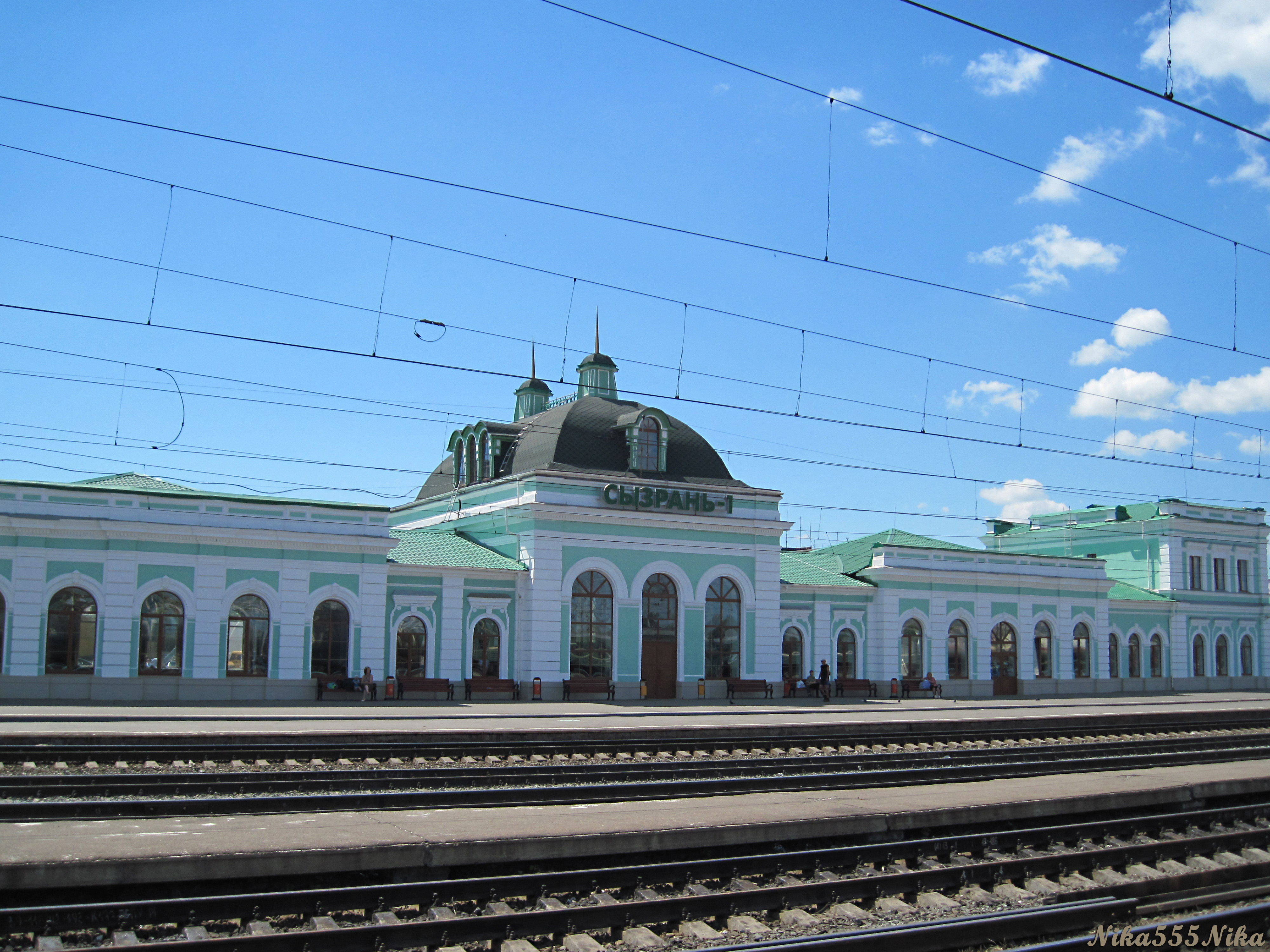 Железнодорожный вокзал станции Сызрань, построенный в 1884 году, является памятником архитектуры.